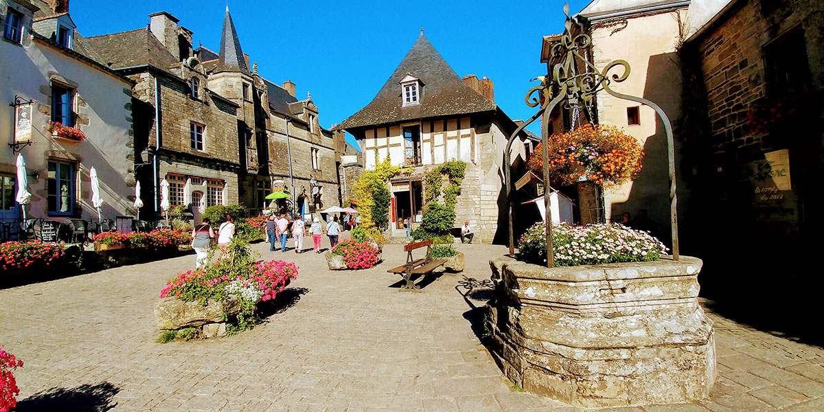 La Villa de Rochefort-en-Terre en 2018.